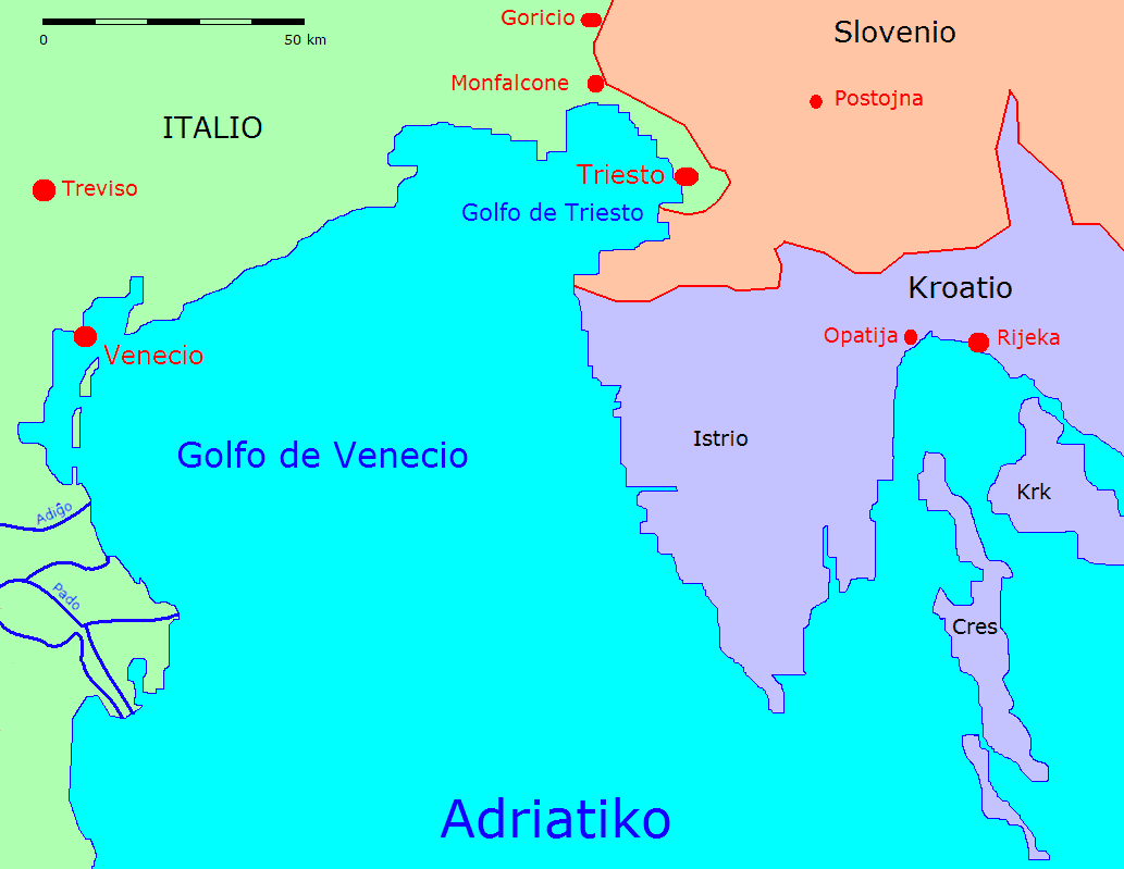 Mapo de norda Adriatiko